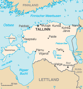 Karte von Estland Übersetzung: Benutzer:Pit